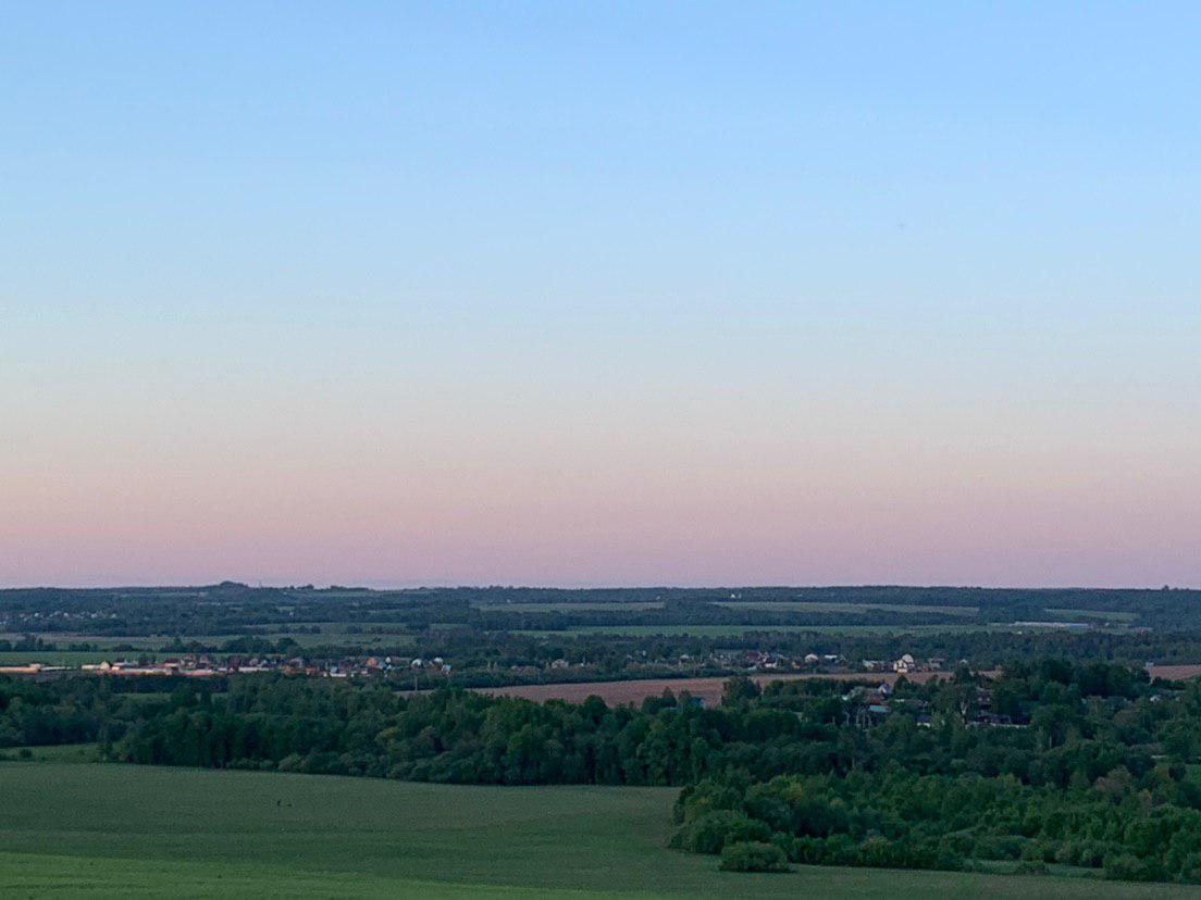 Вид на деревню с холма поселка Ольявидово